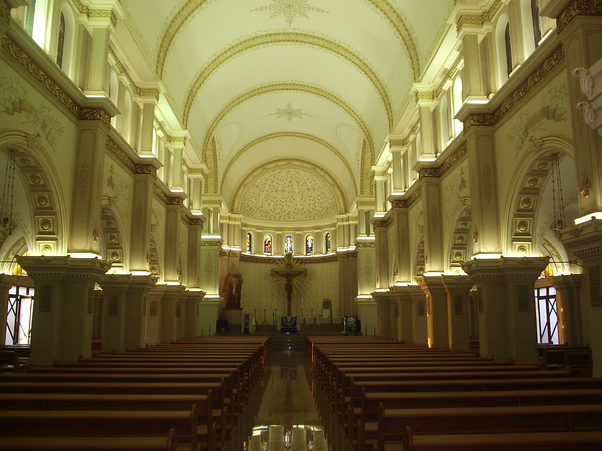 Interior da Catedral Angelopolitana, sé da Diocese de Santo Ângelo, Rio Grande do Sul.